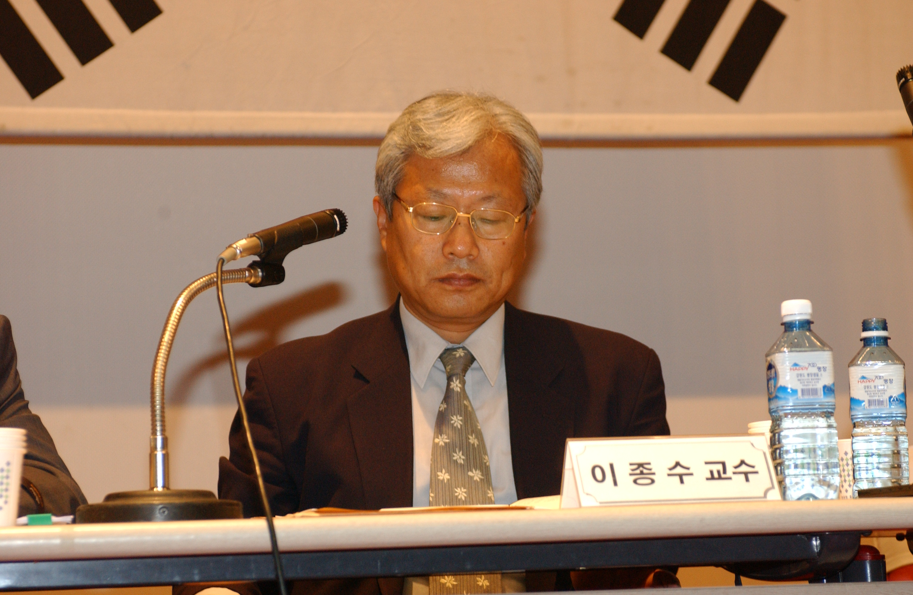 이종수, 2003년 6월 서울특별시 영등포구 사립학교교직원연금관리공단 국회소방방재정책연구회 주관 세미나 '국가 재해관리시스템 어떻게 개편할 것인가'